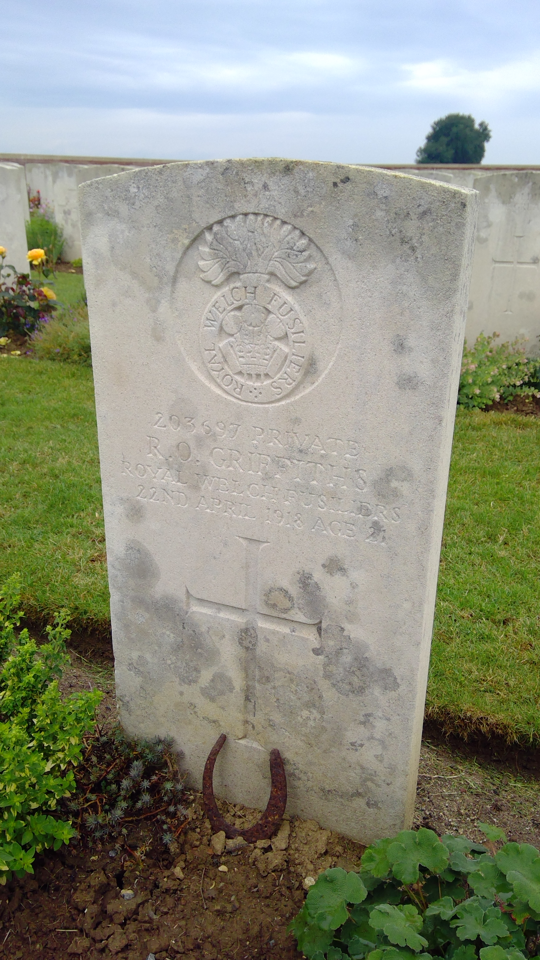 Carreg fedd Robert Owen Griffith o Llangwnnadl, Llyn.